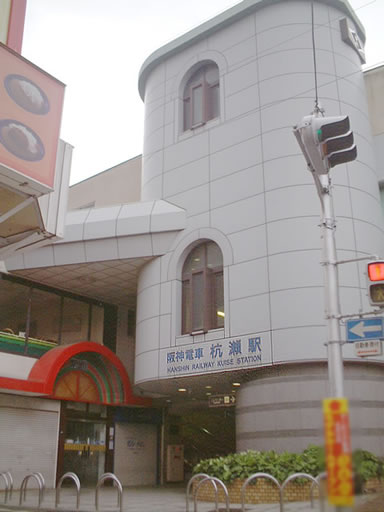 阪神電車ja:杭瀬駅